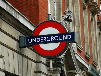 英國倫敦，倫敦地下鐵系統「Underground」標誌 倫敦地下鐵系統「Underground」（倫敦人常暱稱為「Tube」）堪稱是全世界地下鐵系統的先驅之一，路線遍及整個大倫敦地區。圖中所見為主要幹線皮卡迪里線（Piccadilly Line）在市中心地帶的南肯辛頓（South Kensington）站外、緊鄰倫敦科學博物館（London Science Museum）的地鐵出口標誌。 本圖片由上傳者User:SElephant拍攝於2004年8月。